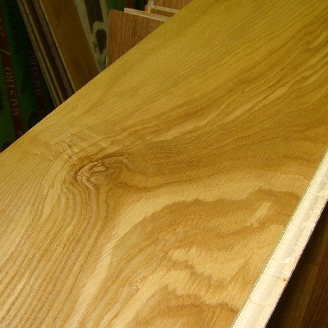 Однополосная паркетная доска